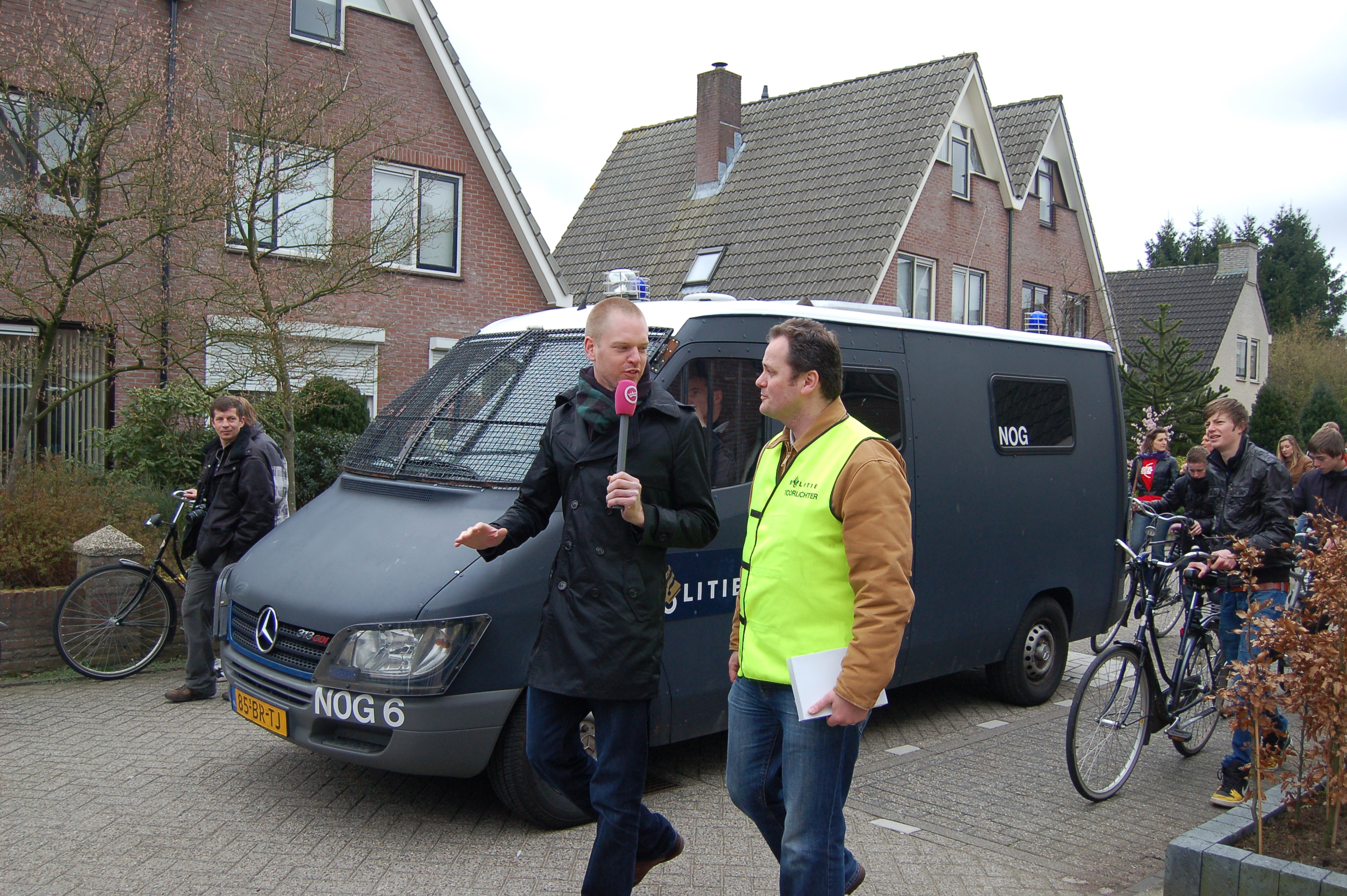 Jelte Sondij (GeenStijl) interviewt een persvoorlichter van de politie.Foto gemaakt tijdens de NVU-demonstratie in Ede.